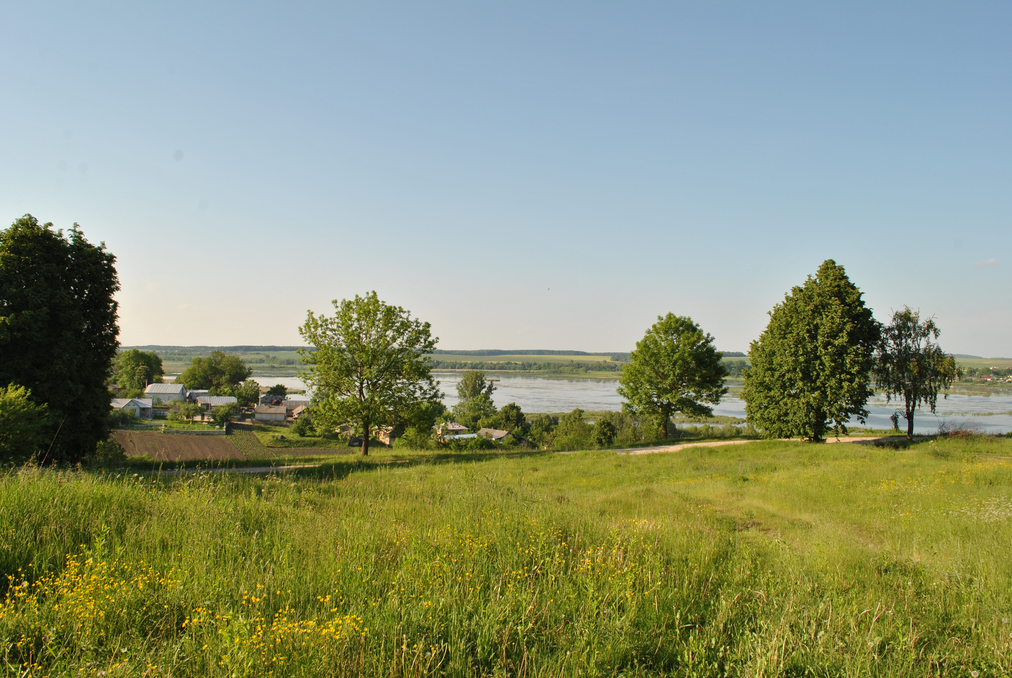 Гідрологічний заказник «Серетський» у заболоченій заплаві р. Серет між селами Глядки та Малашівці Зборівського району Тернопільської області України.